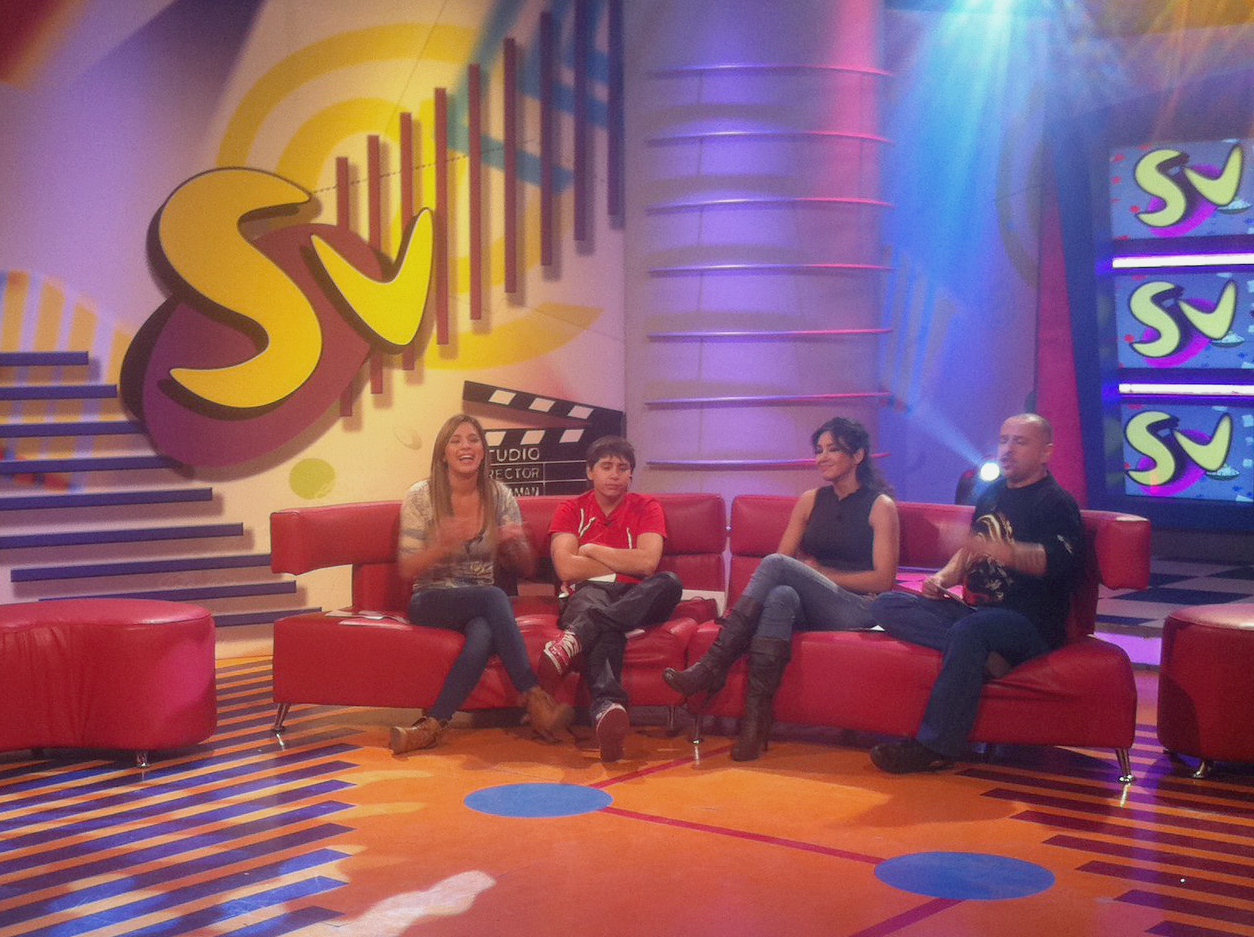 El estudio de grabación del programa Sin vergüenza de Chilevisión. De izquierda a derecha, los animadores Gianella Marengo, Karol Dance, Mariuxi Domínguez y Rodrigo «Pera» Cuadra.